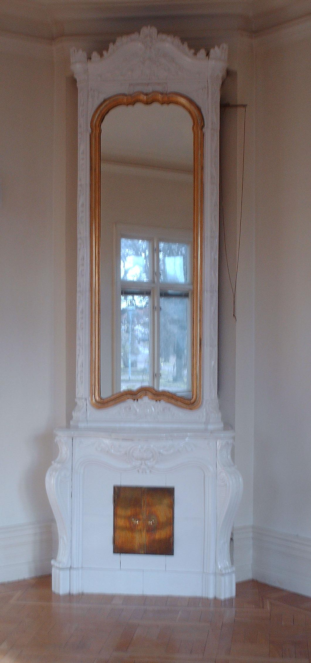 Kakelugn med infälld spegel, Villa Victoria, Motala